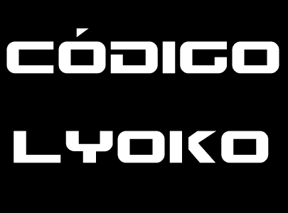 Código Lyoko escrito con Gunship.